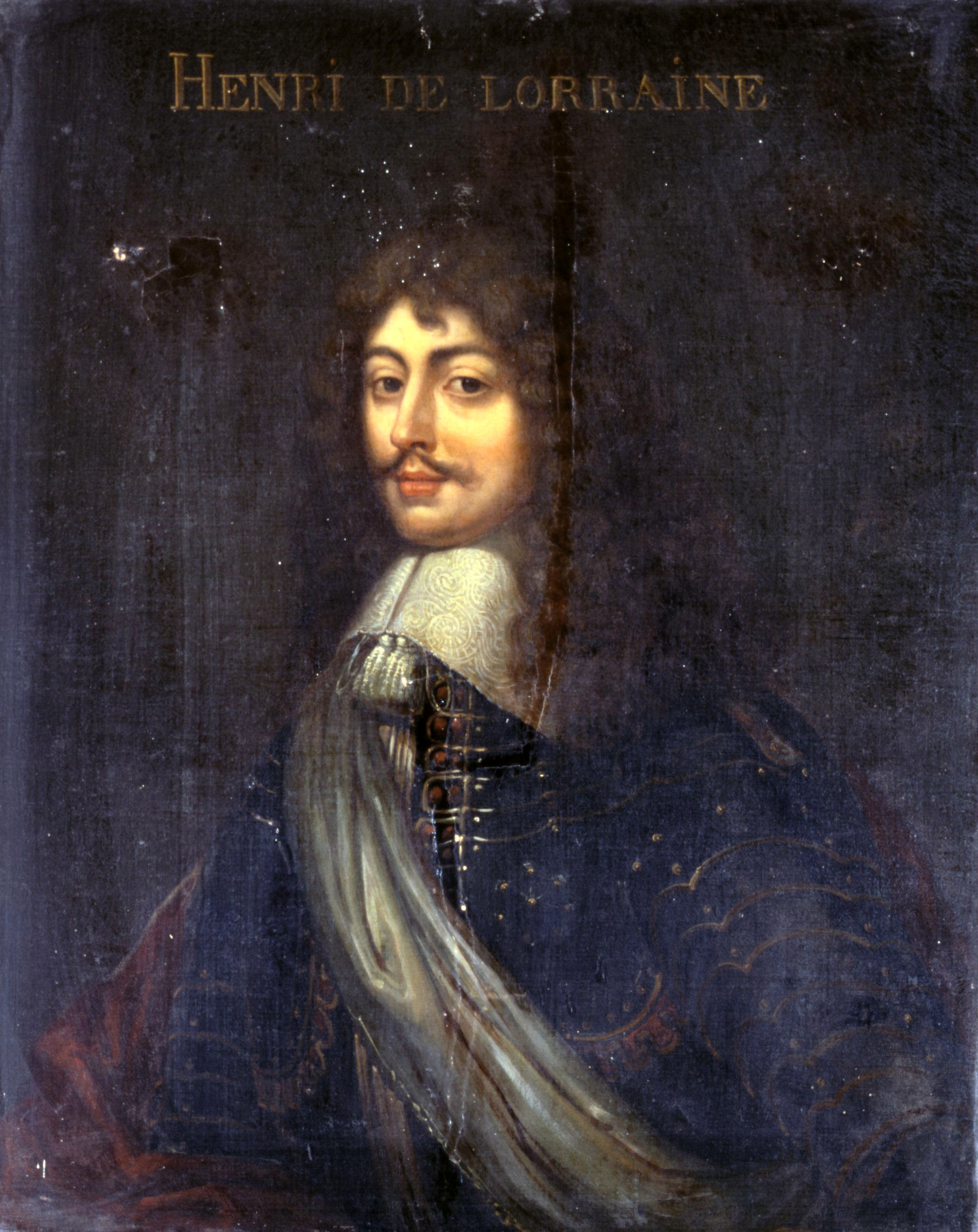 Zeitgenössisches Porträt Henris II. de Lorraine, Herzog von Guise